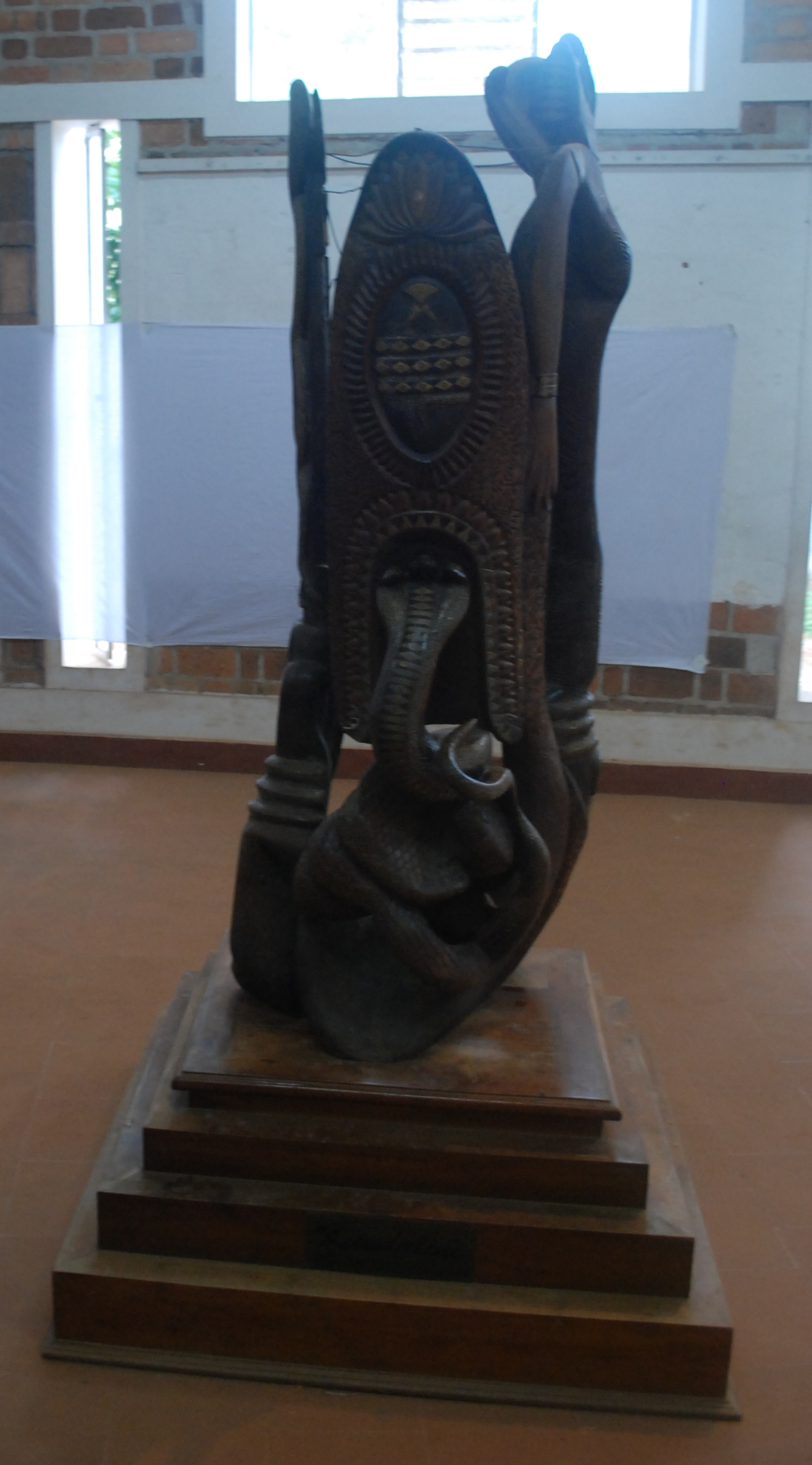 ജയപാലപ്പണിക്കരുടെ കുണ്ഡലിനി ശില്പ്പം